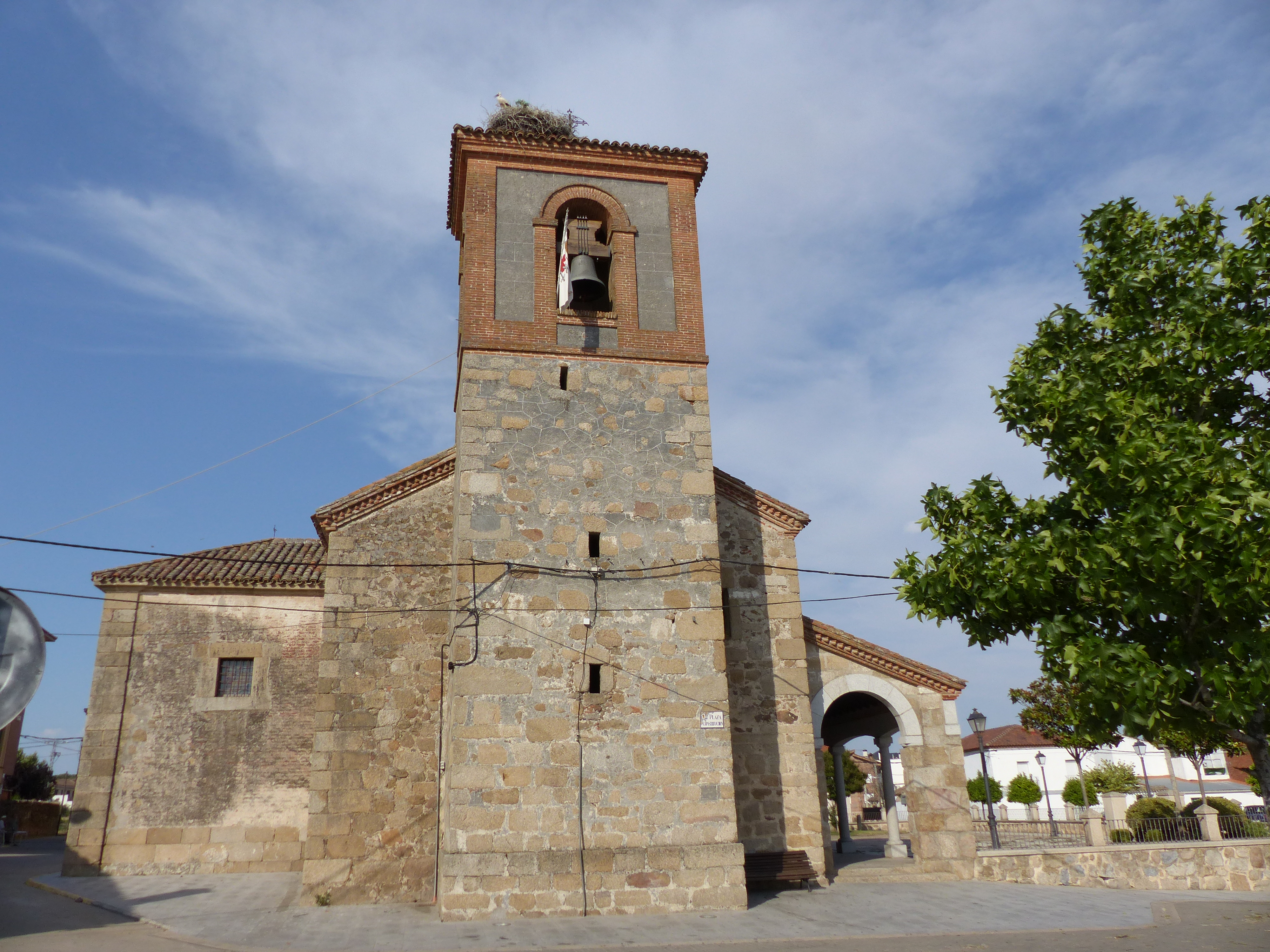 Parroquia de Nuestra Señora de la Asunción, Mejorada, Toledo, España